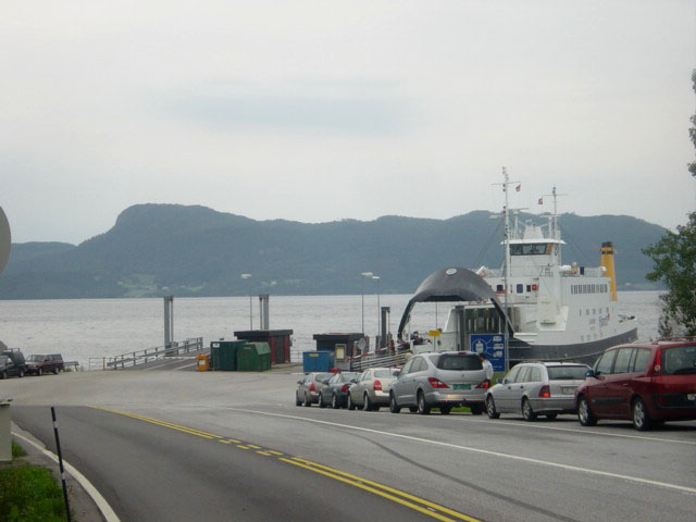 Kanestraum in Norway